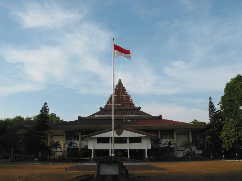 Bendera Merah Putih di halaman UNS Solo